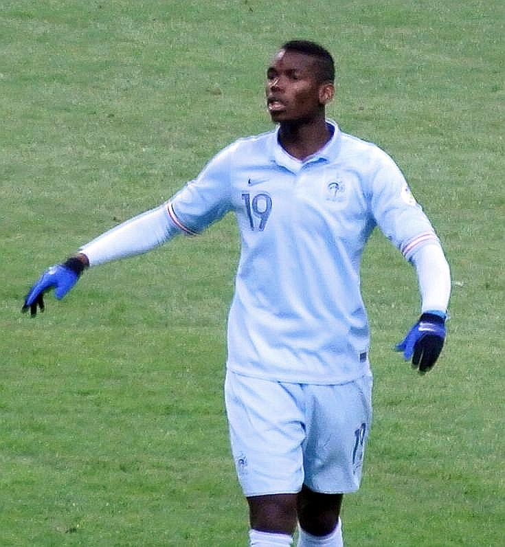 Pogba avec la France face à la Georgie, le 22 mars 2013